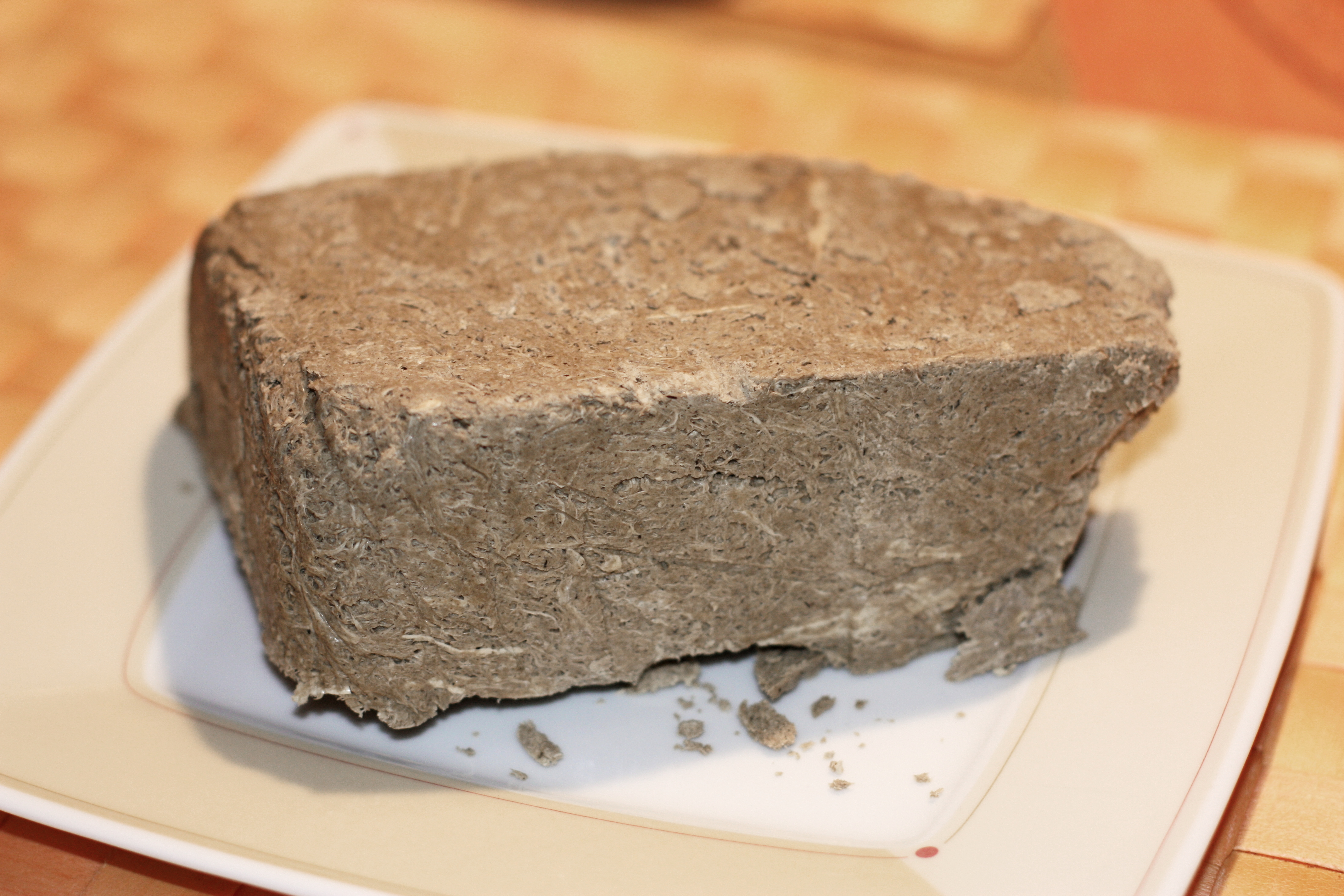 Halva